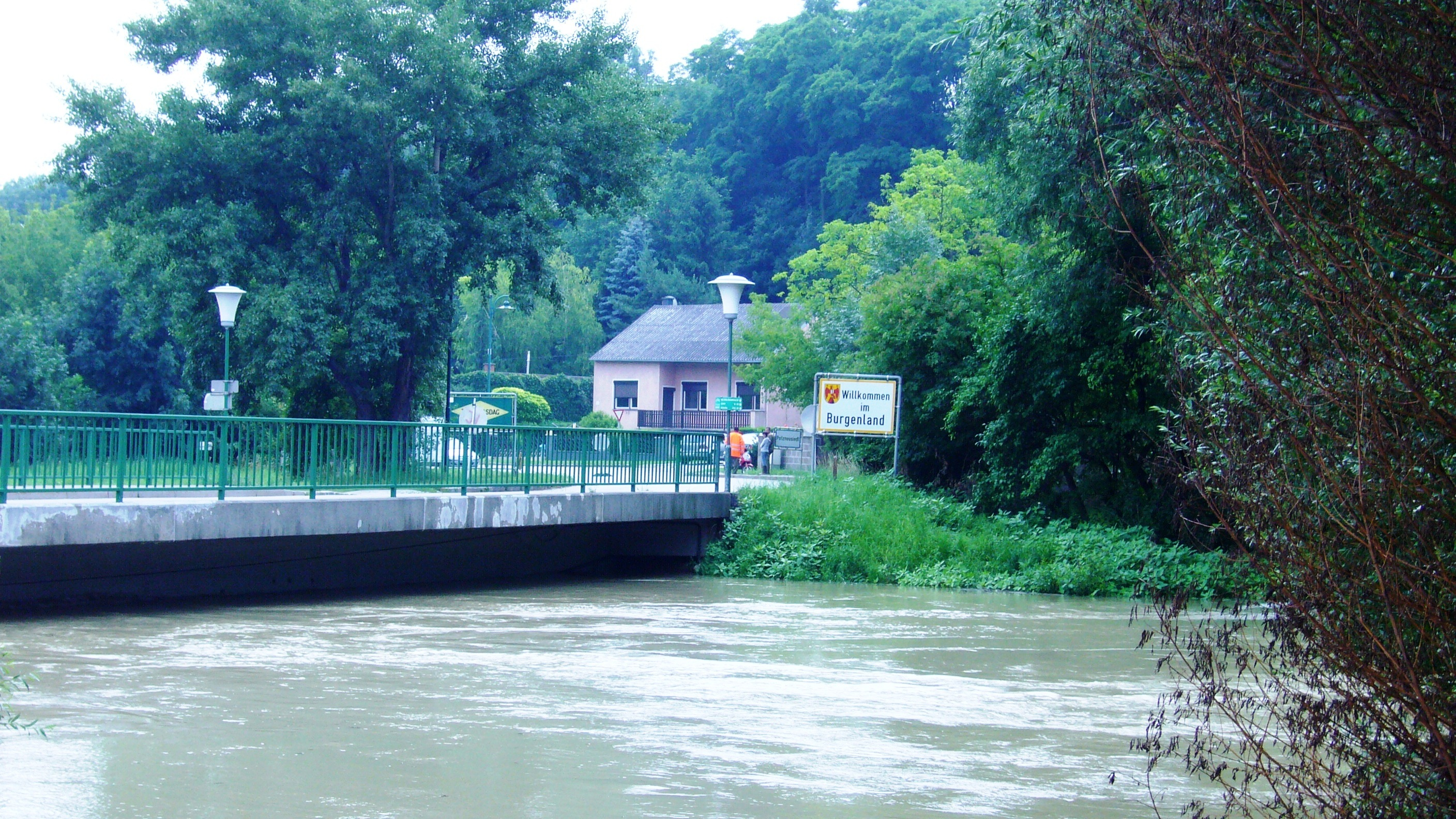 Potzenusiedl - Brücke